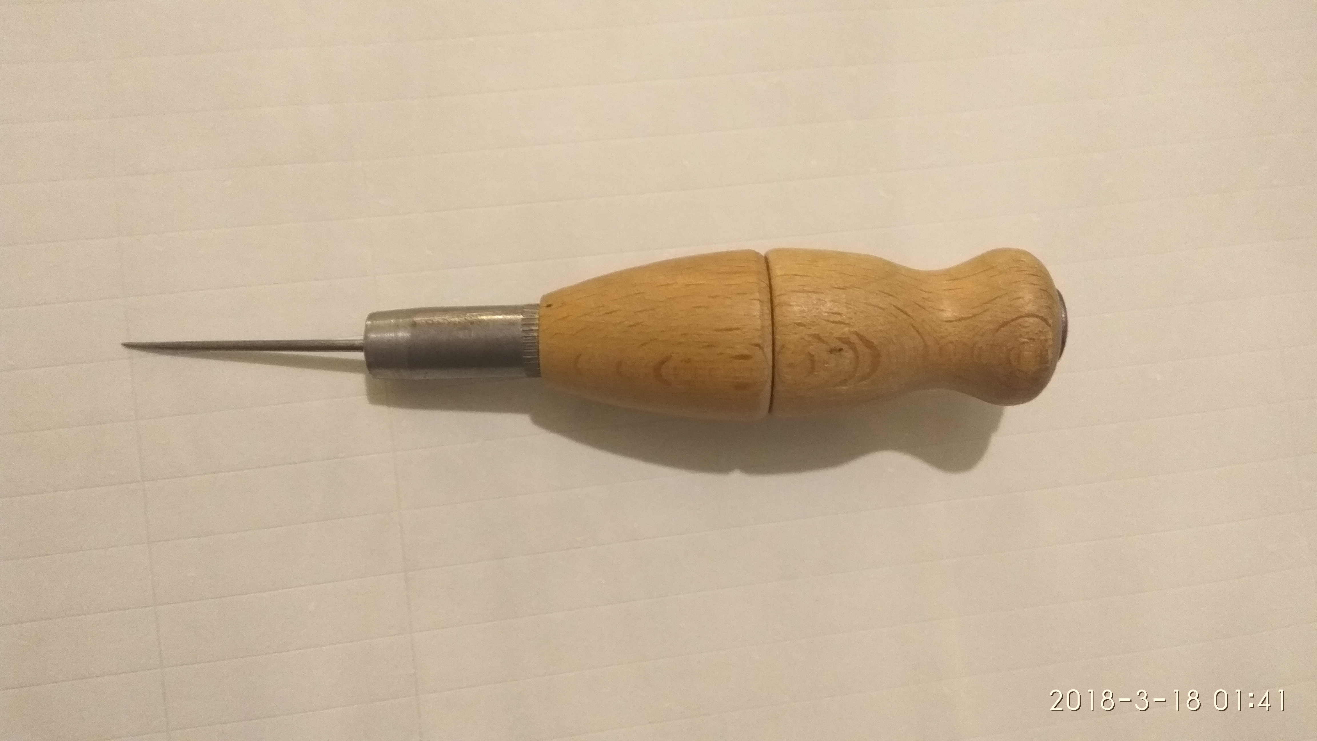 מרצע על רקע יריעה של ספר תורה ששורטטה על ידי מרצע